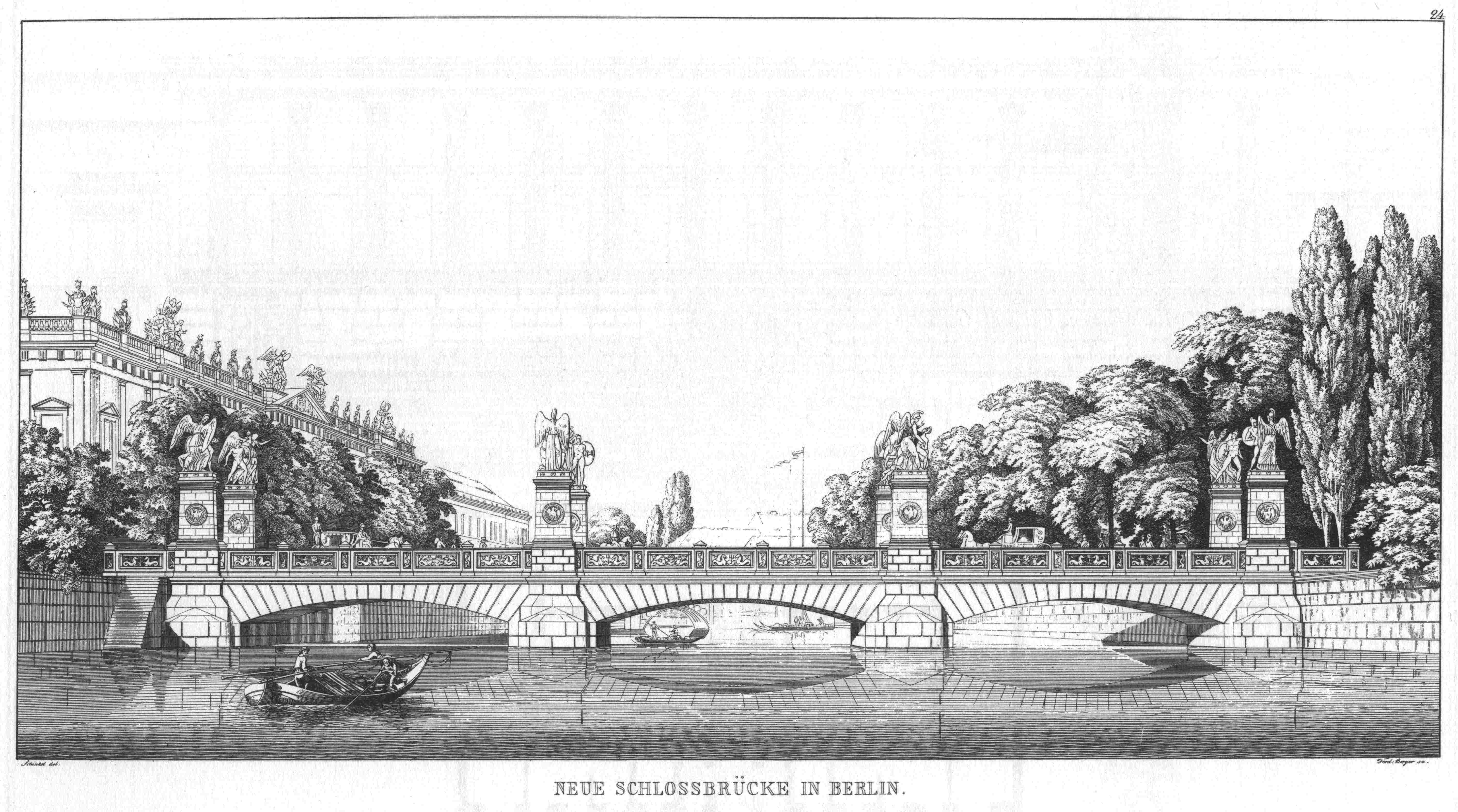 Berlin, Palace Bridge (Schlossbrücke), architectural design by Carl Friedrich Schinkel